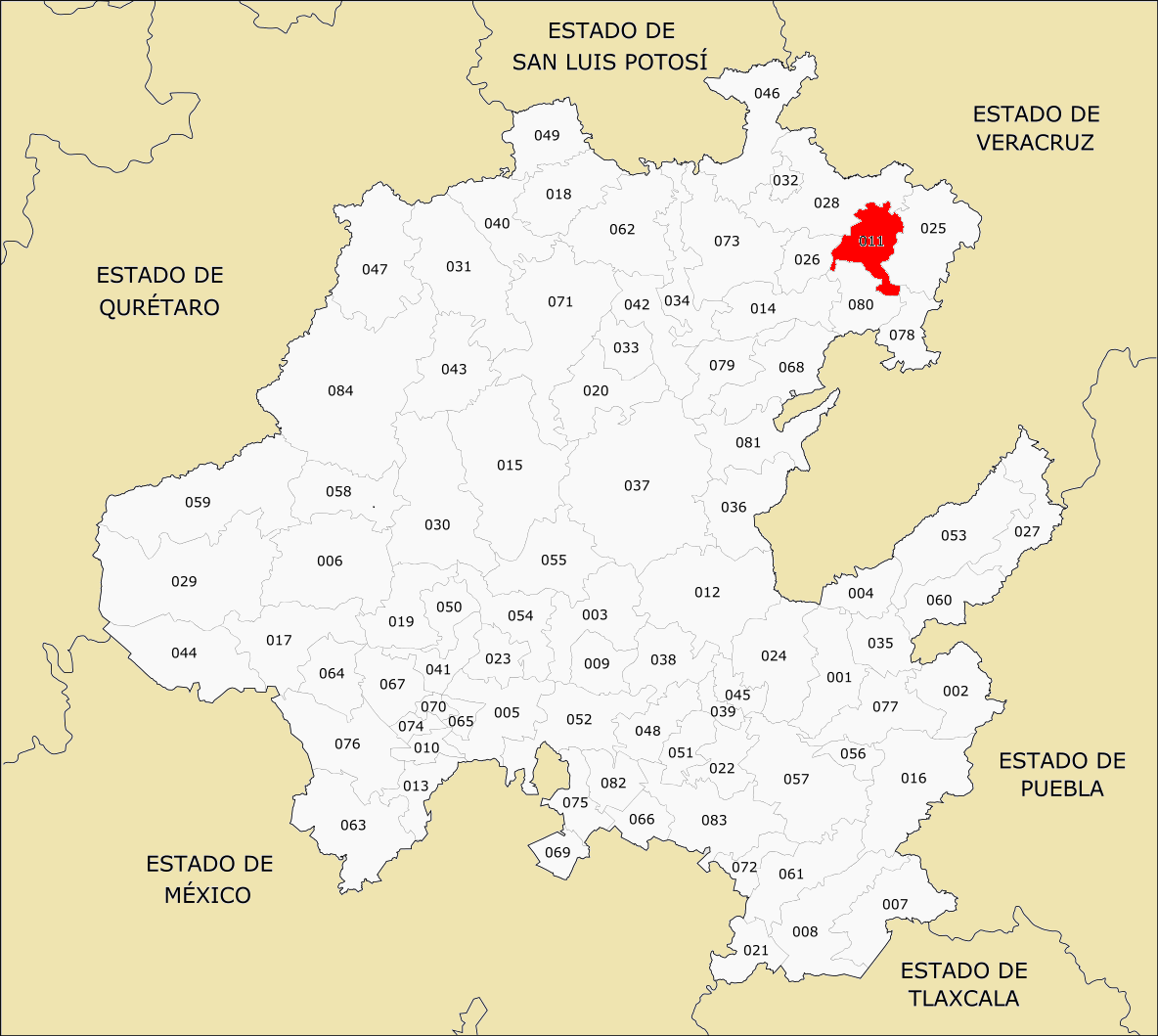 Municipio de Hidalgo